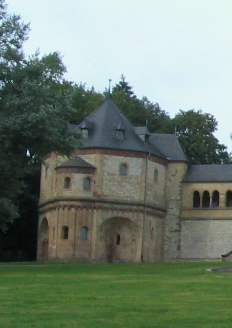 Pfalzkapelle „St. Ulrich“, Kaiserpfalz Goslar